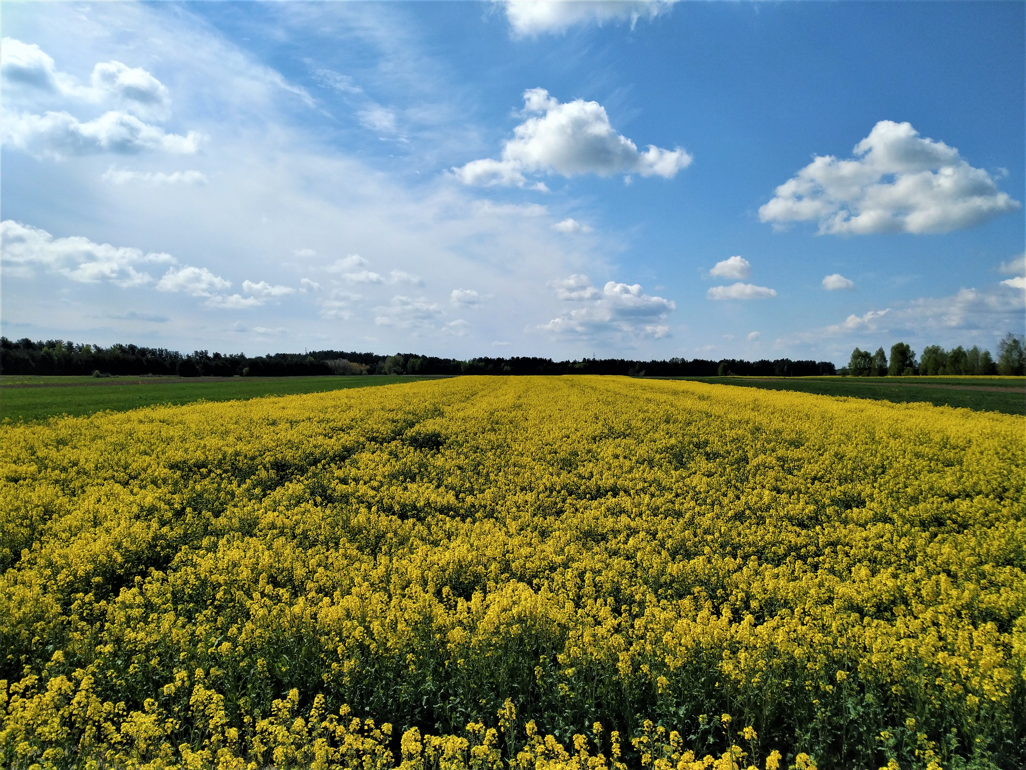 Pole rzepaku w granicach Łukowa